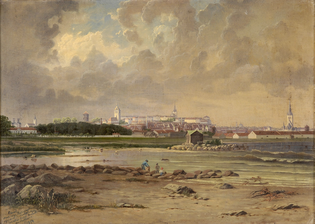 Ansicht von Reval. Datiert 1884. Öl auf Leinwand/Malk., 46 x 64 cm